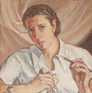 Autoritratto by Giola Gandini